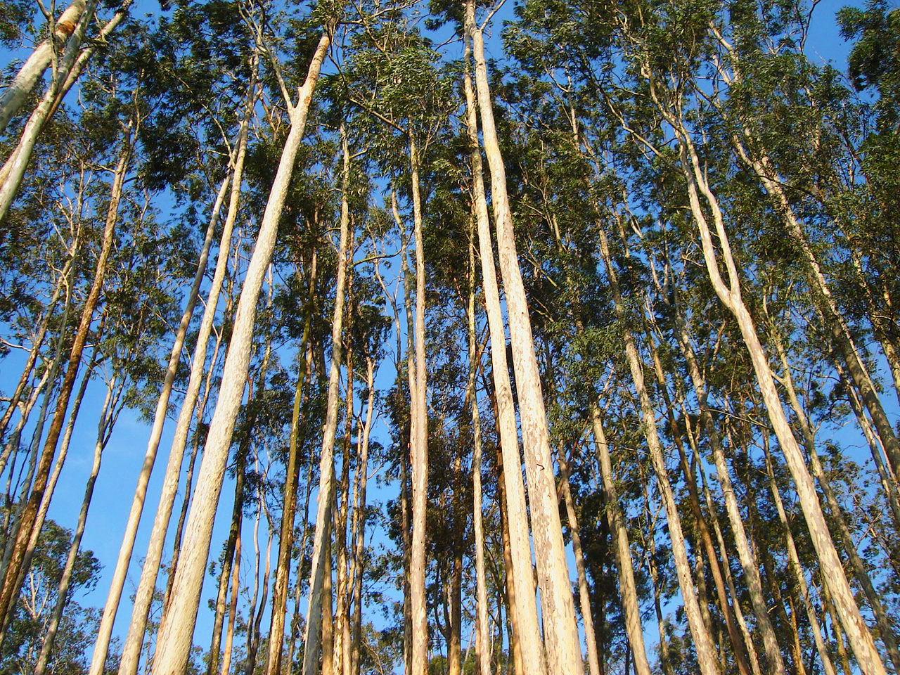 Talhão de eucalipto localizado no campus da Universidade Federal Rural do Rio de Janeiro em Seropédica, RJ